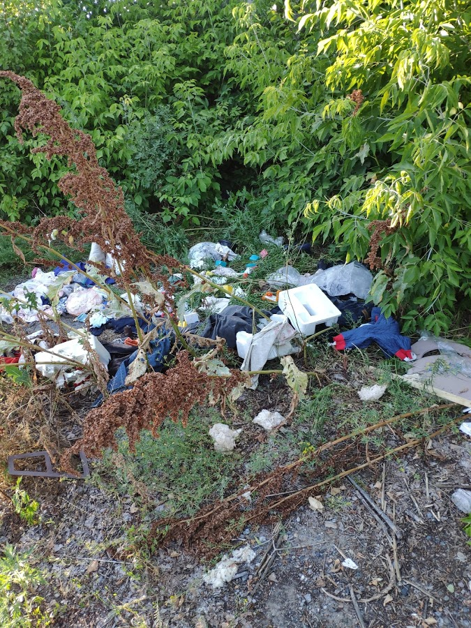 Артилерійські склади Полтава купа сміття